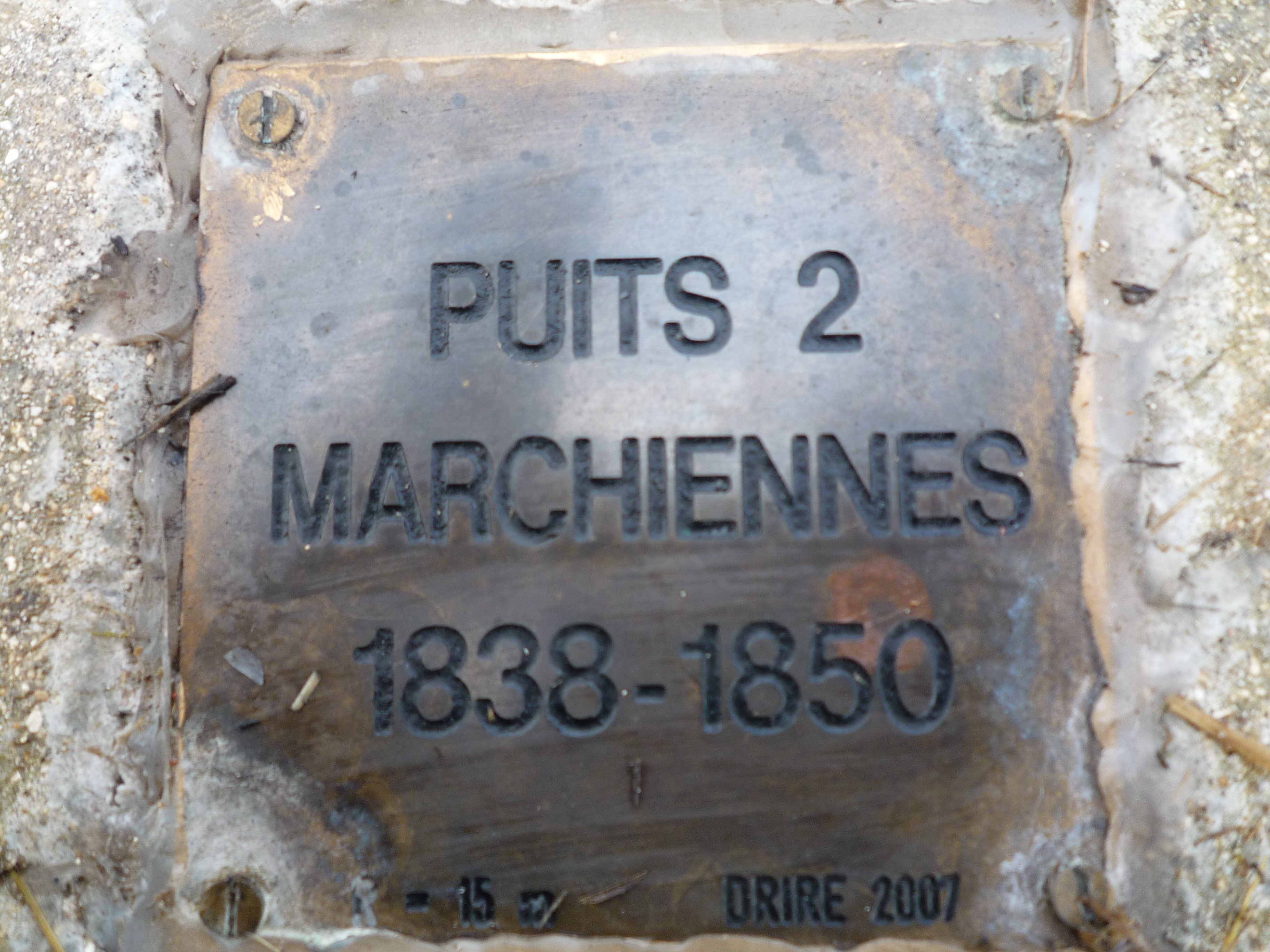 La Seconde Fosse de Marchiennes de la Compagnie des Canonniers était un charbonnage constitué d'un seul puits situé à Marchiennes, Nord, Nord-Pas-de-Calais, France.